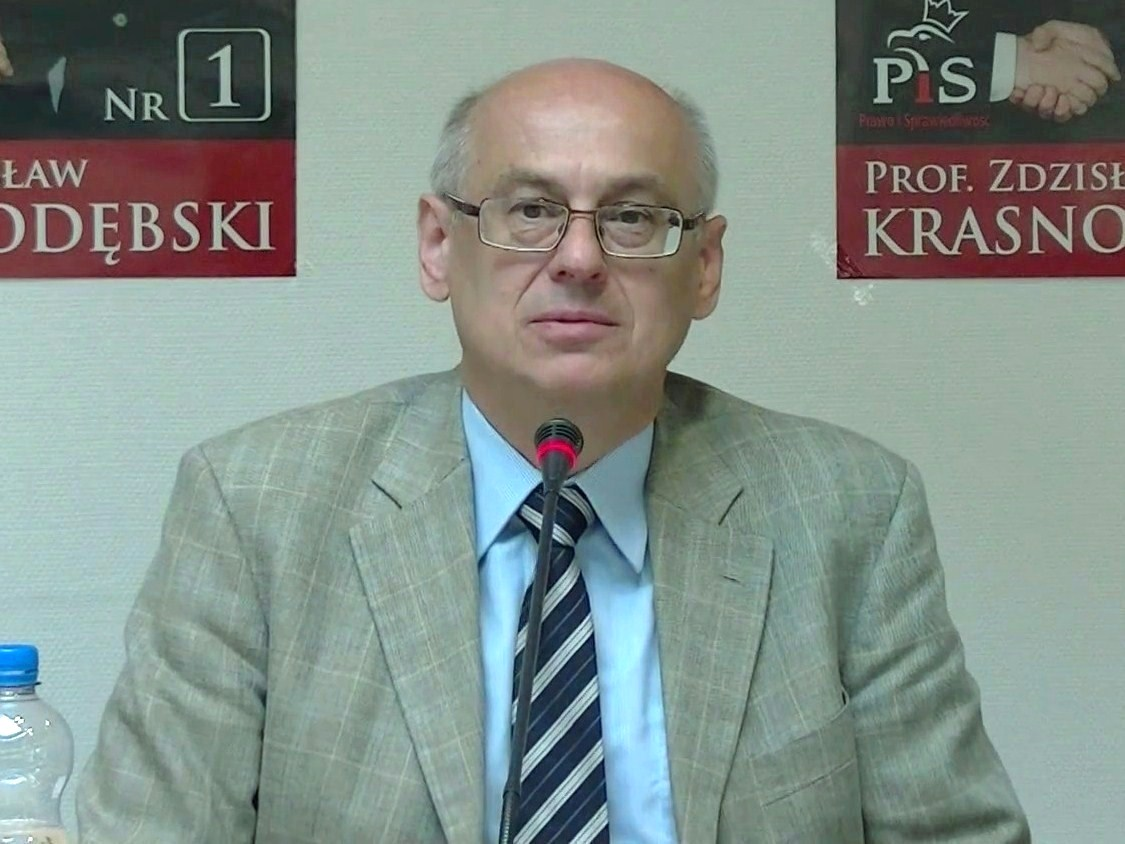 Prof. Zdzisław Krasnodębski (socjolog) w Berlinie.